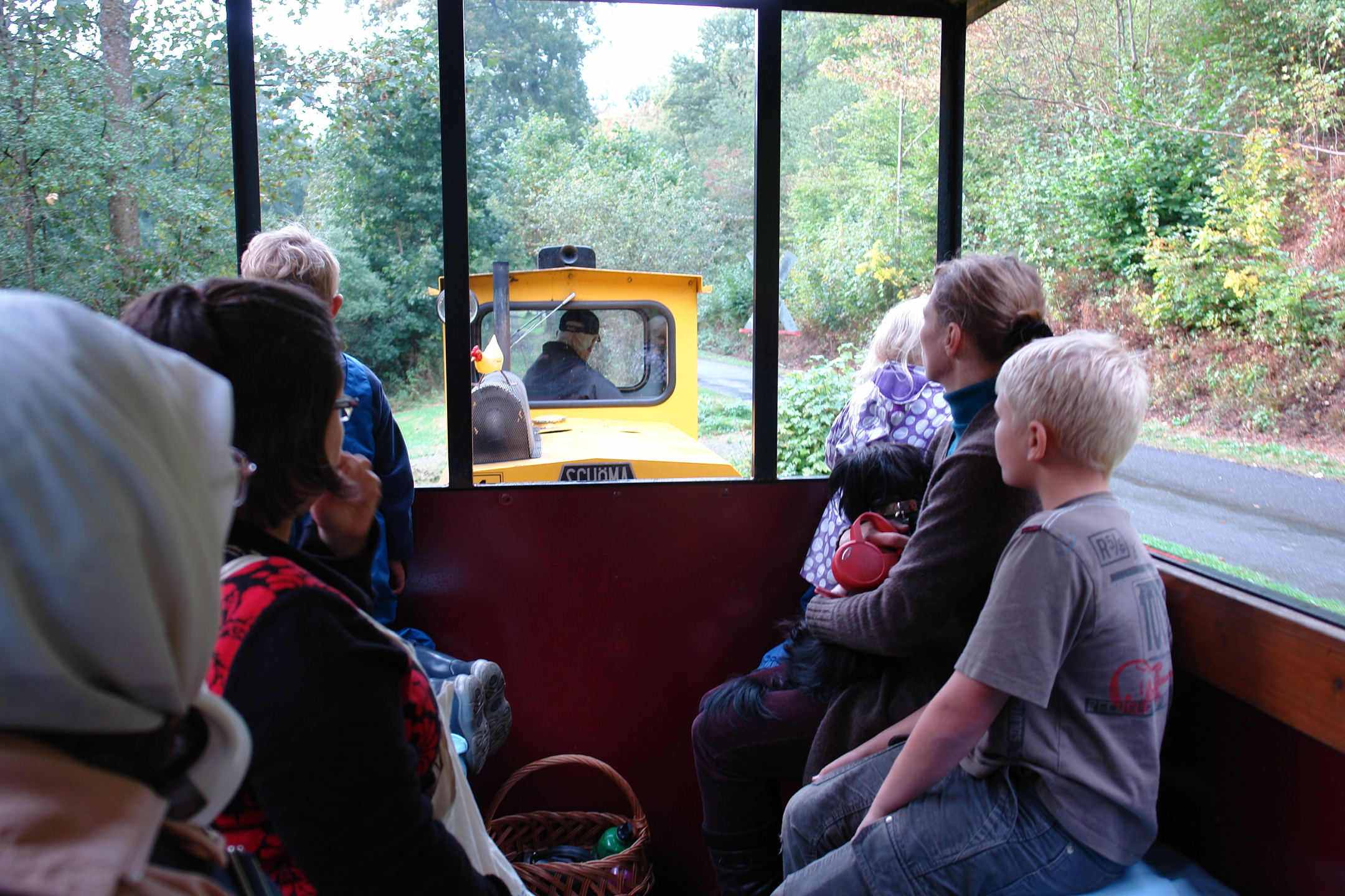 Bad Schwalbacher Kurbahn